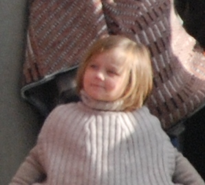 Prinsesse Isabella under Hubertusjagten 2010.